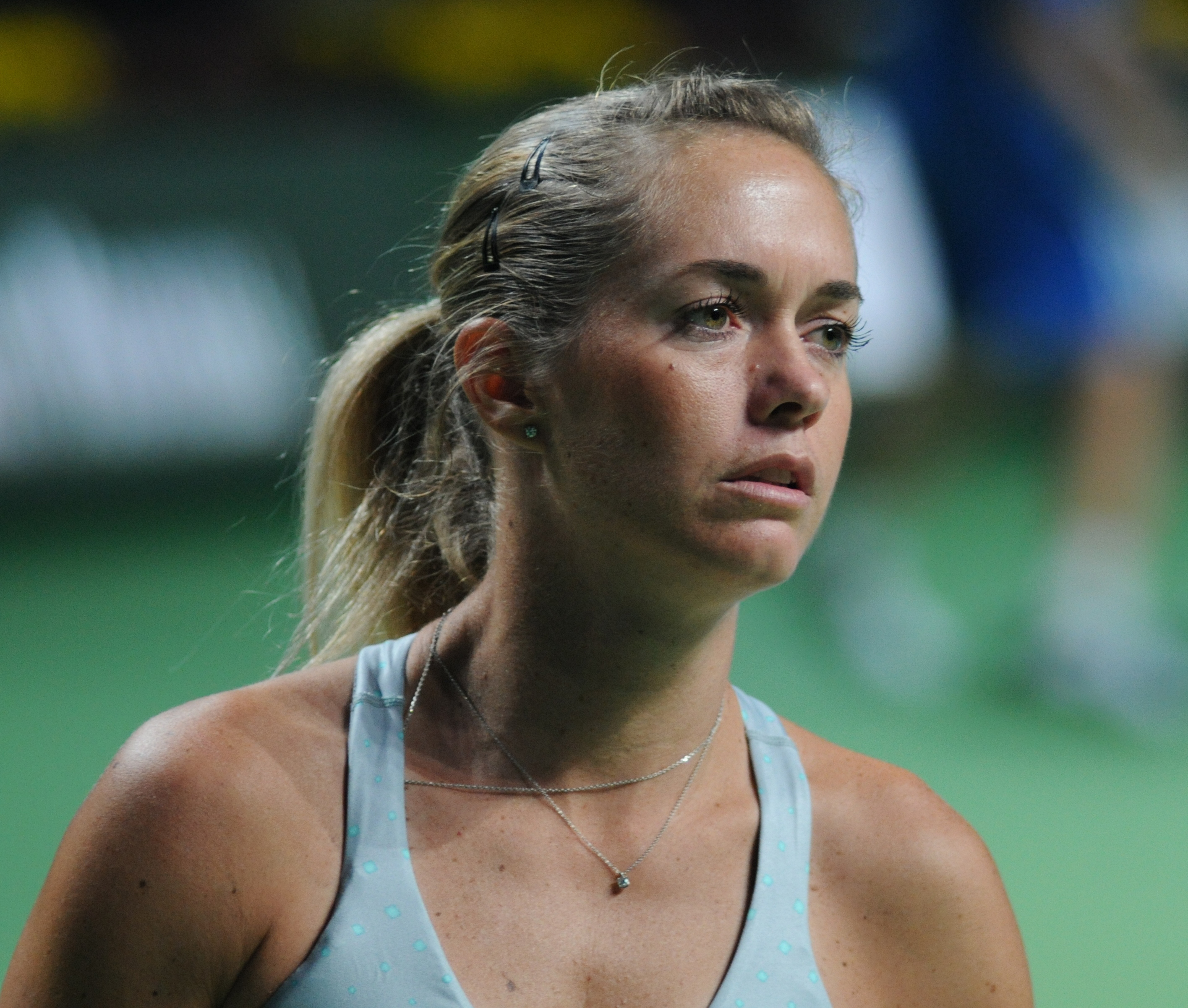 Klára Koukalová at the 2014 Kremlin Cup